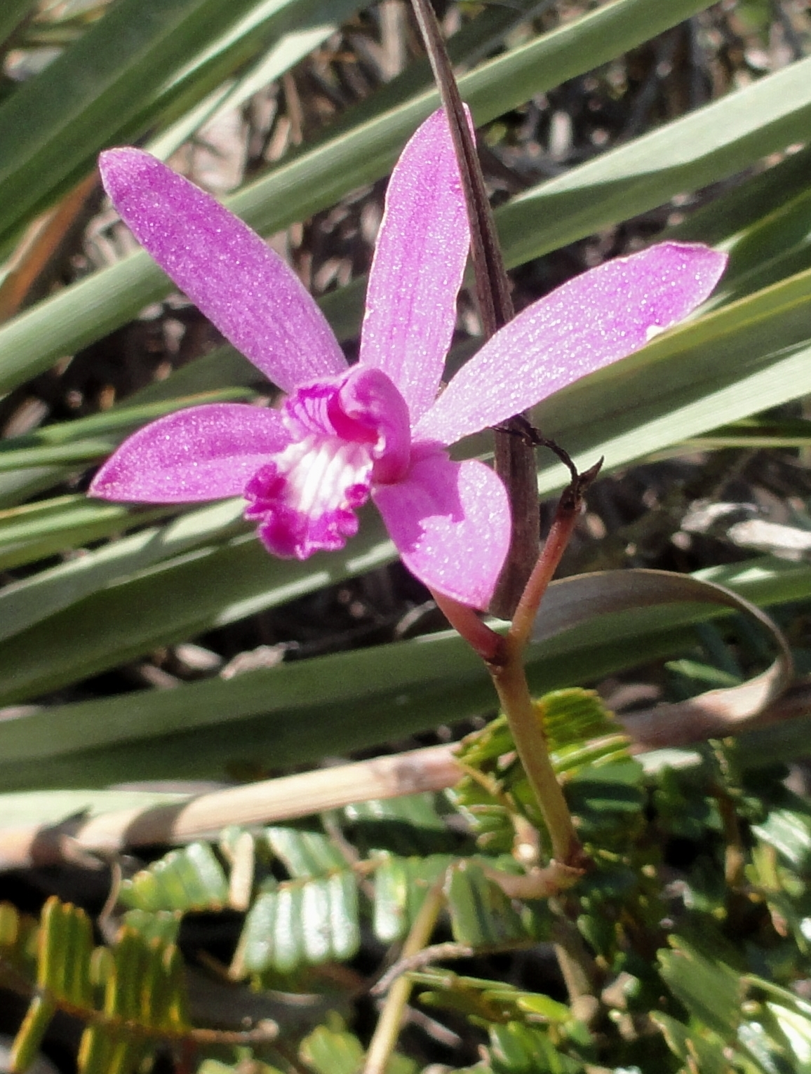 Orquídea (Cattleya pfisteri) em mata de Cerrado, recorte - Chapada Diamantina BA, (2011)